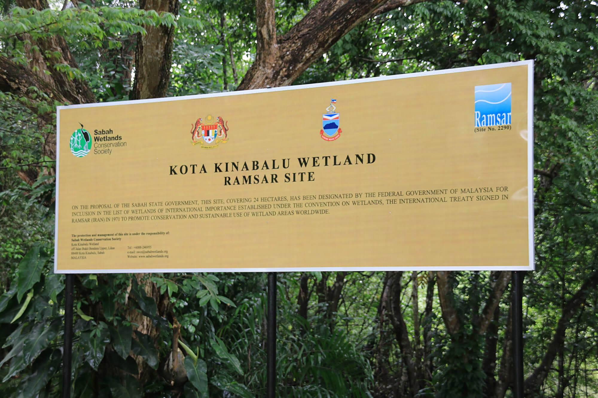 コタキナバルウェットランドにあるラムサールサイト登録湿地を表す看板